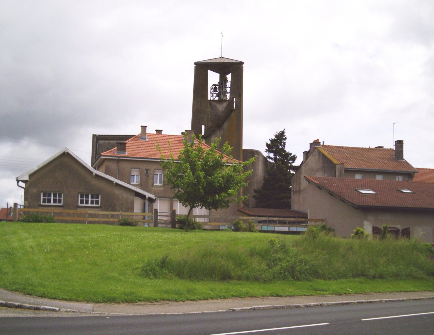 Moyenvic 57 France